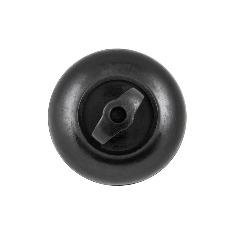 Łącznik obrotowy, 1950 rok. Ówczesna nazwa producenta: PZPE Kontakt.